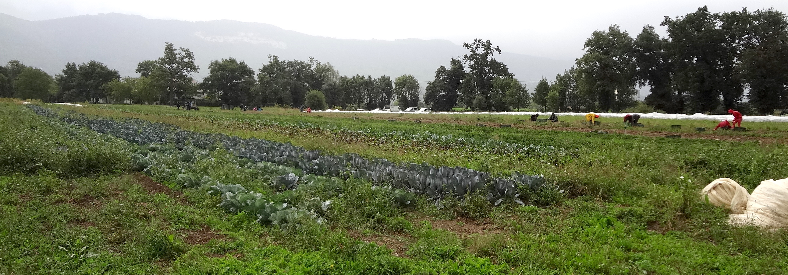 Terrain de Landecy des Jardins de Cocagne. Jour pluvieux.